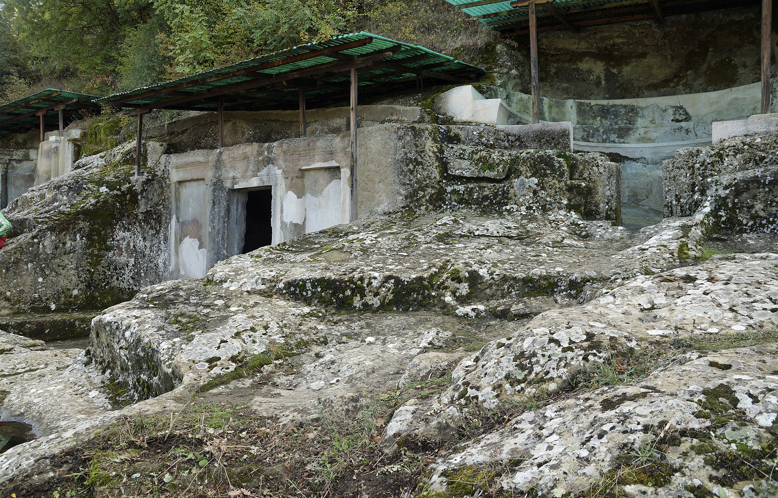 Selca e Poshtmë, Albania: tombs 1 (left) and 2